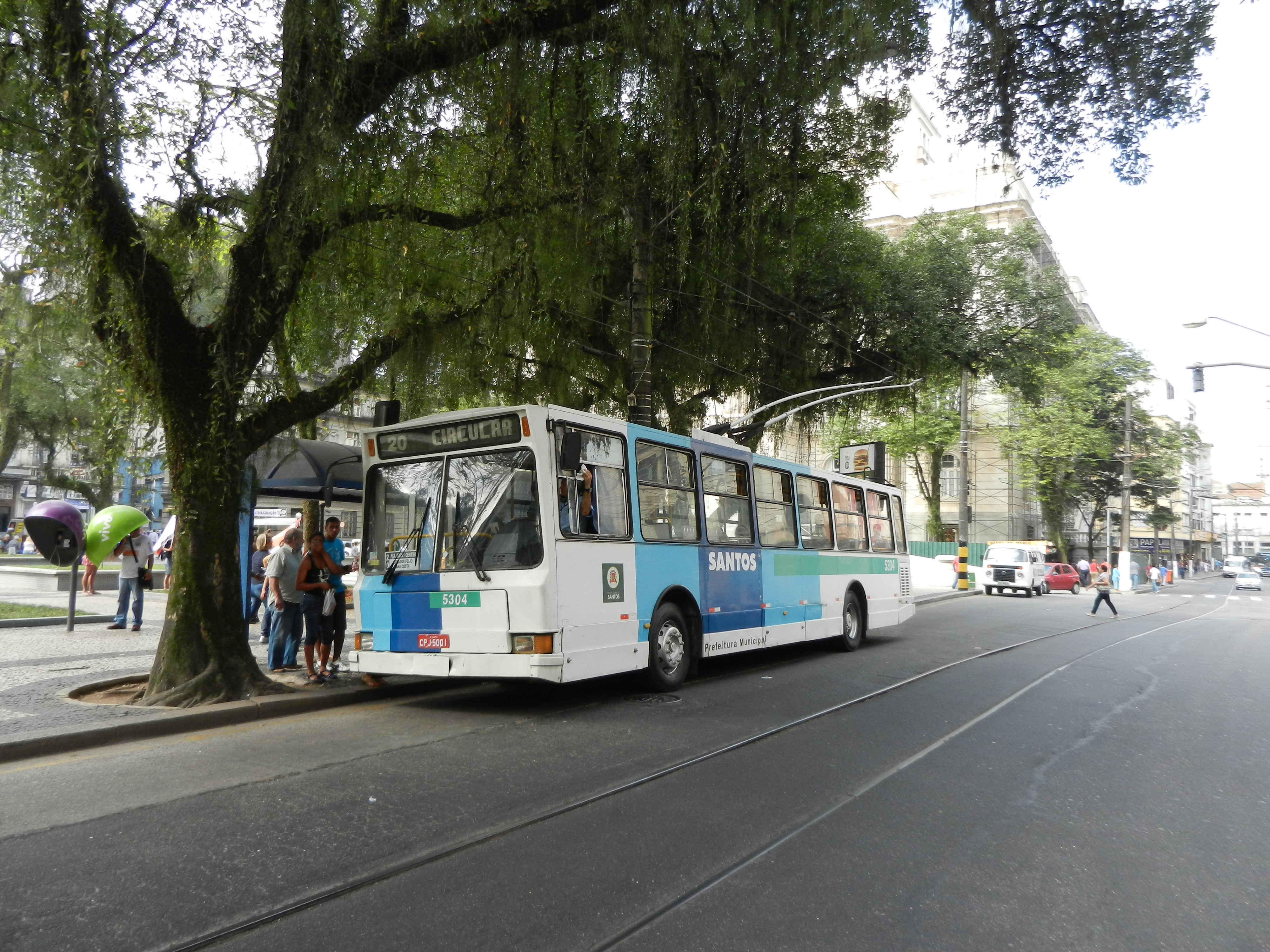 Trolebus de Santos